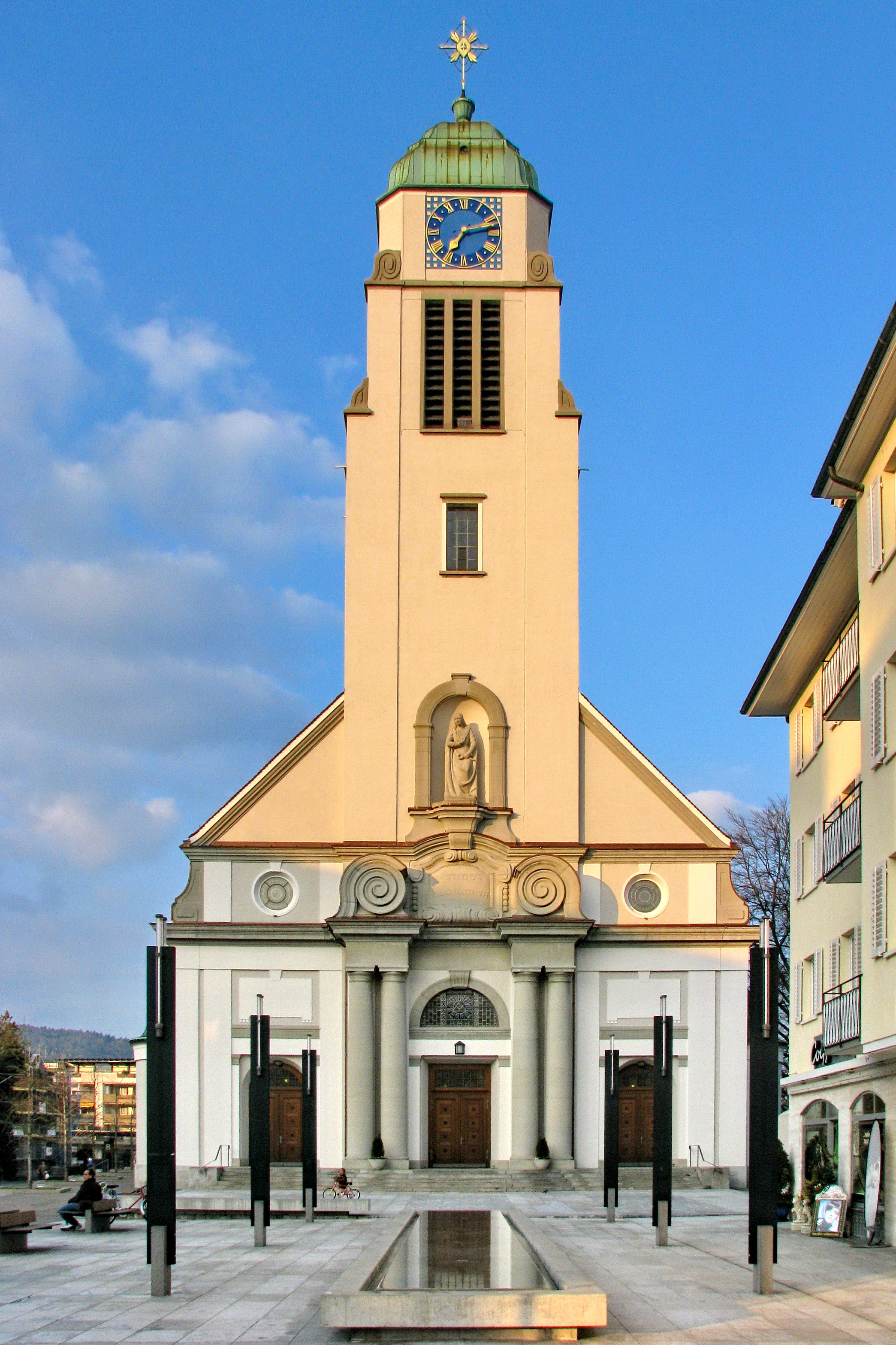 St. Agatha Kirche in Dietikon